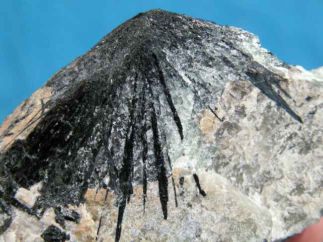 egiryn i apatyt, pochodzenie Rosja, Płw. Kolski; autor zdjęcia Piotr Menducki